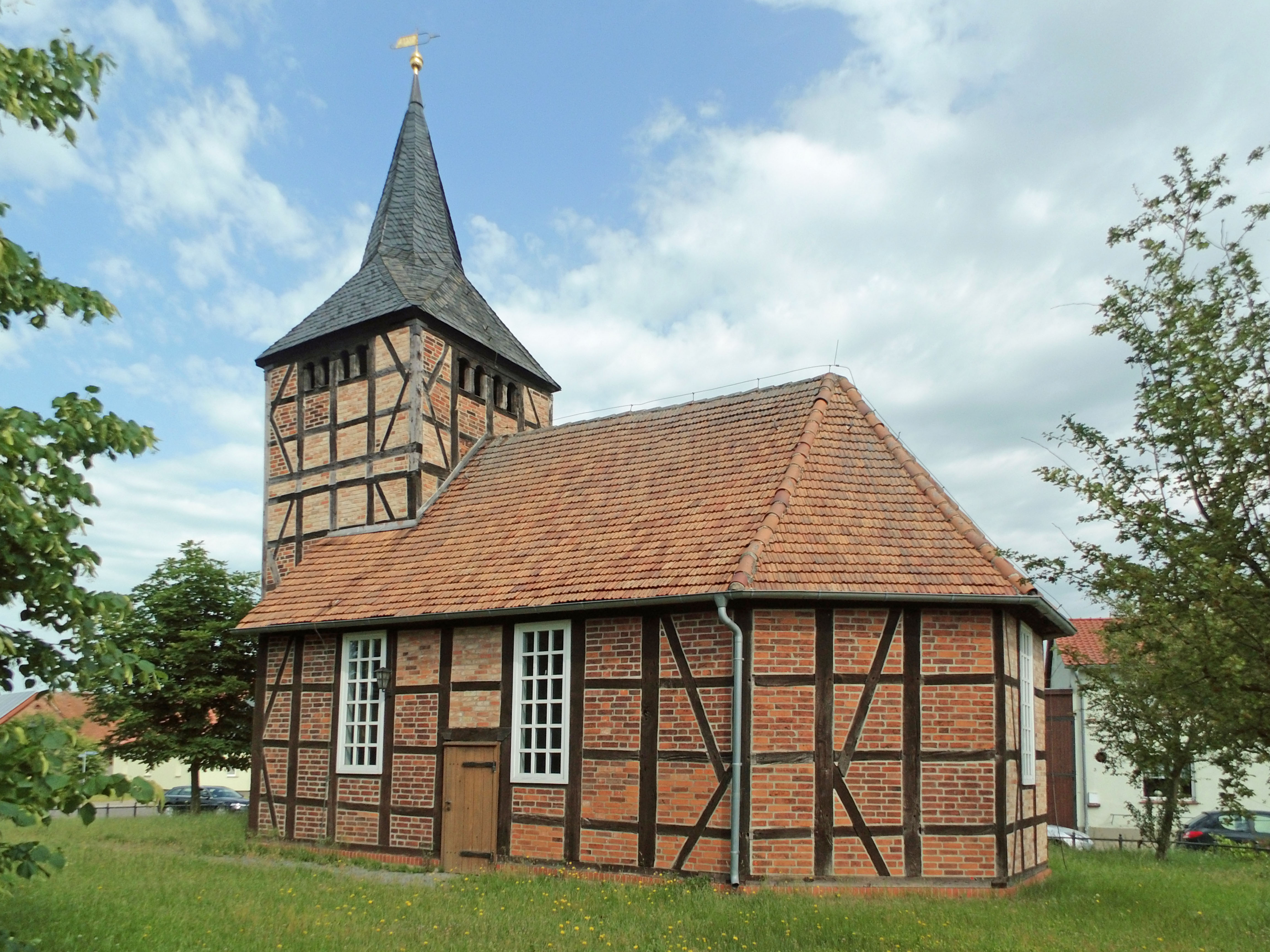 Evengelisch-lutherische Kirche in Potzehne, Ortsteil von Gardelegen.